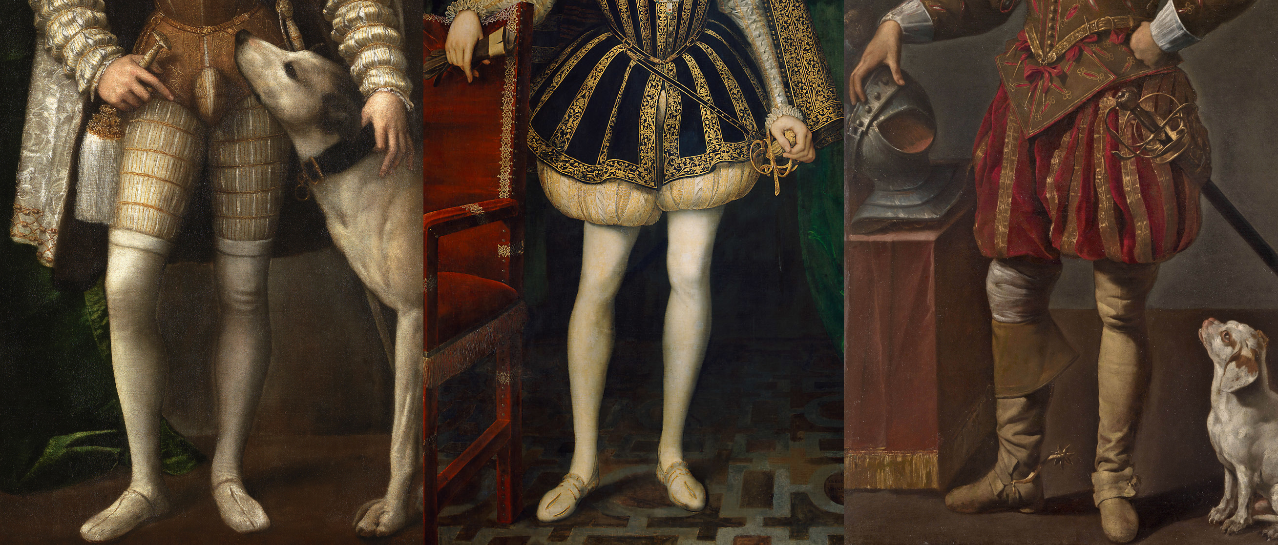 Détails d'huiles sur toile représentant Charles Quint en 1533, Charles IX en 1566 et un gentleman anonyme en 1621.